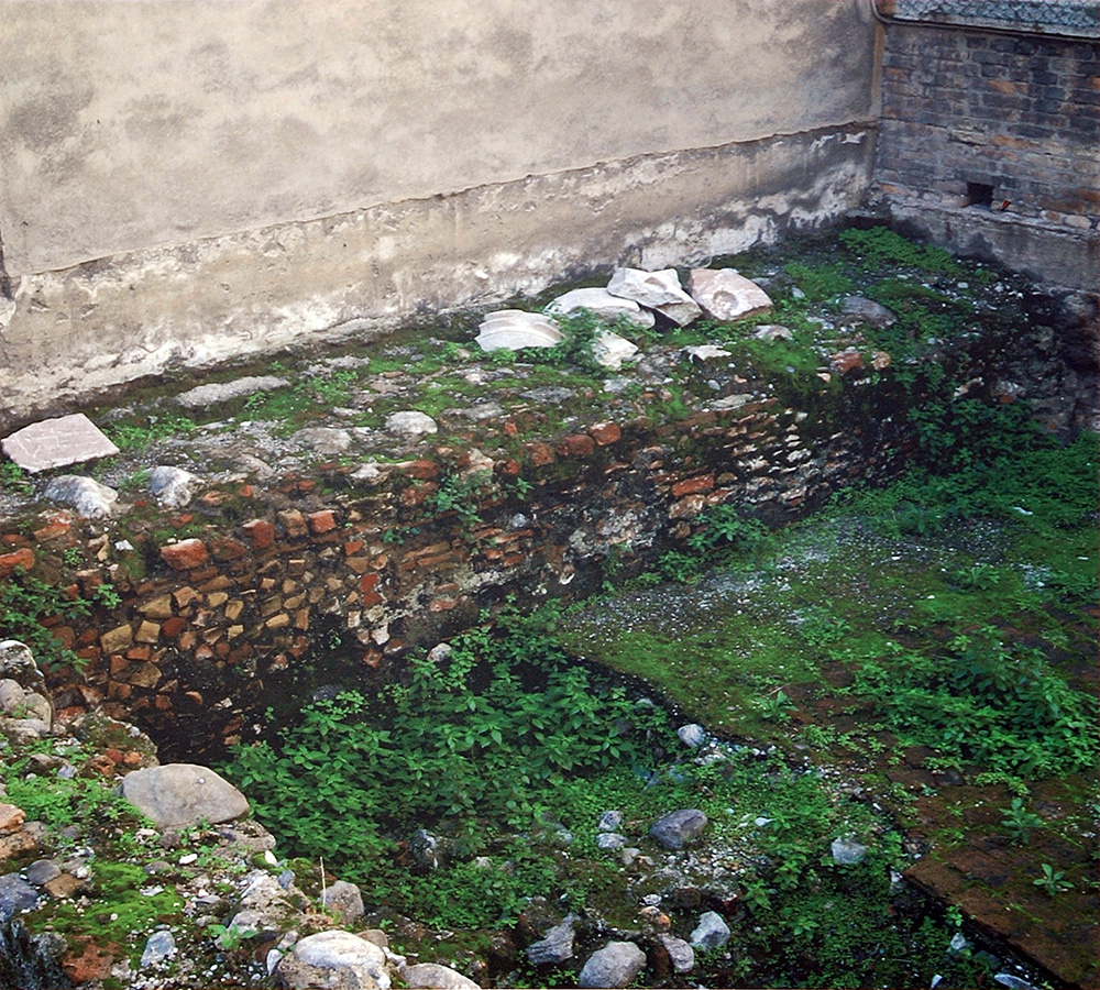 Reggio Calabria:scavi dell'area archeologica Griso-Laboccetta